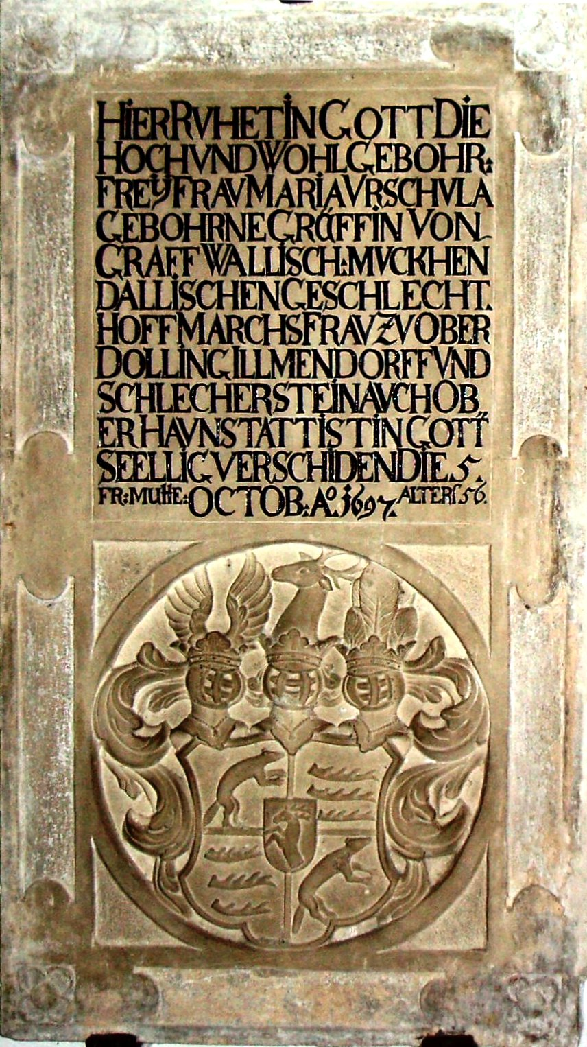 Epitaph der Gräfin Maria Ursula von Muggenthal in der Kirche von Oberdolling, Landkreis Eichstätt